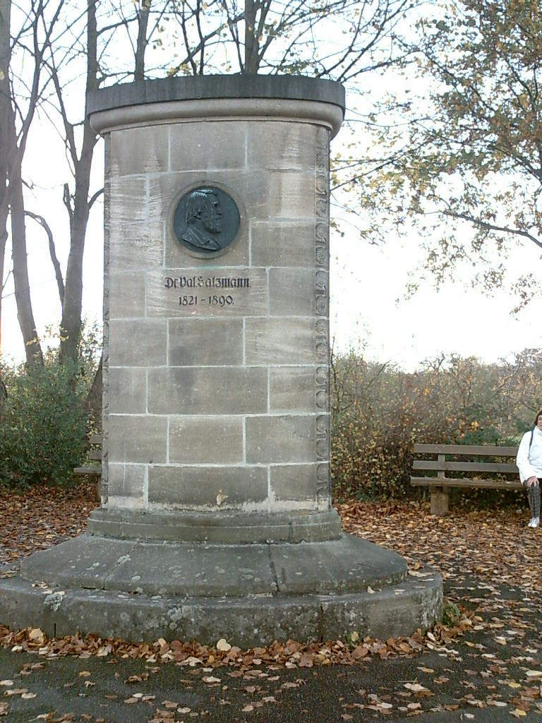 Salzmann-Camerer-Denkmal in Esslingen a. N., selbst fotografiert, 2005